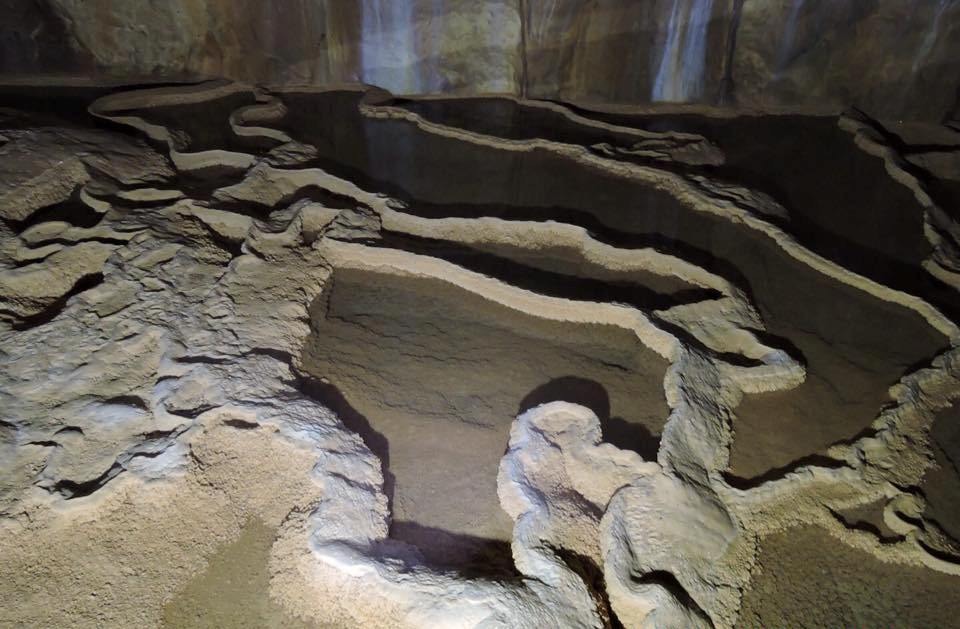 Interno delle grotte